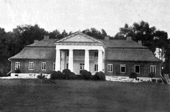 Беларуская (тарашкевіца): Шэметаўшчына (Šemietaŭščyna), сядзіба Скірмунтаў (Skirmunt)